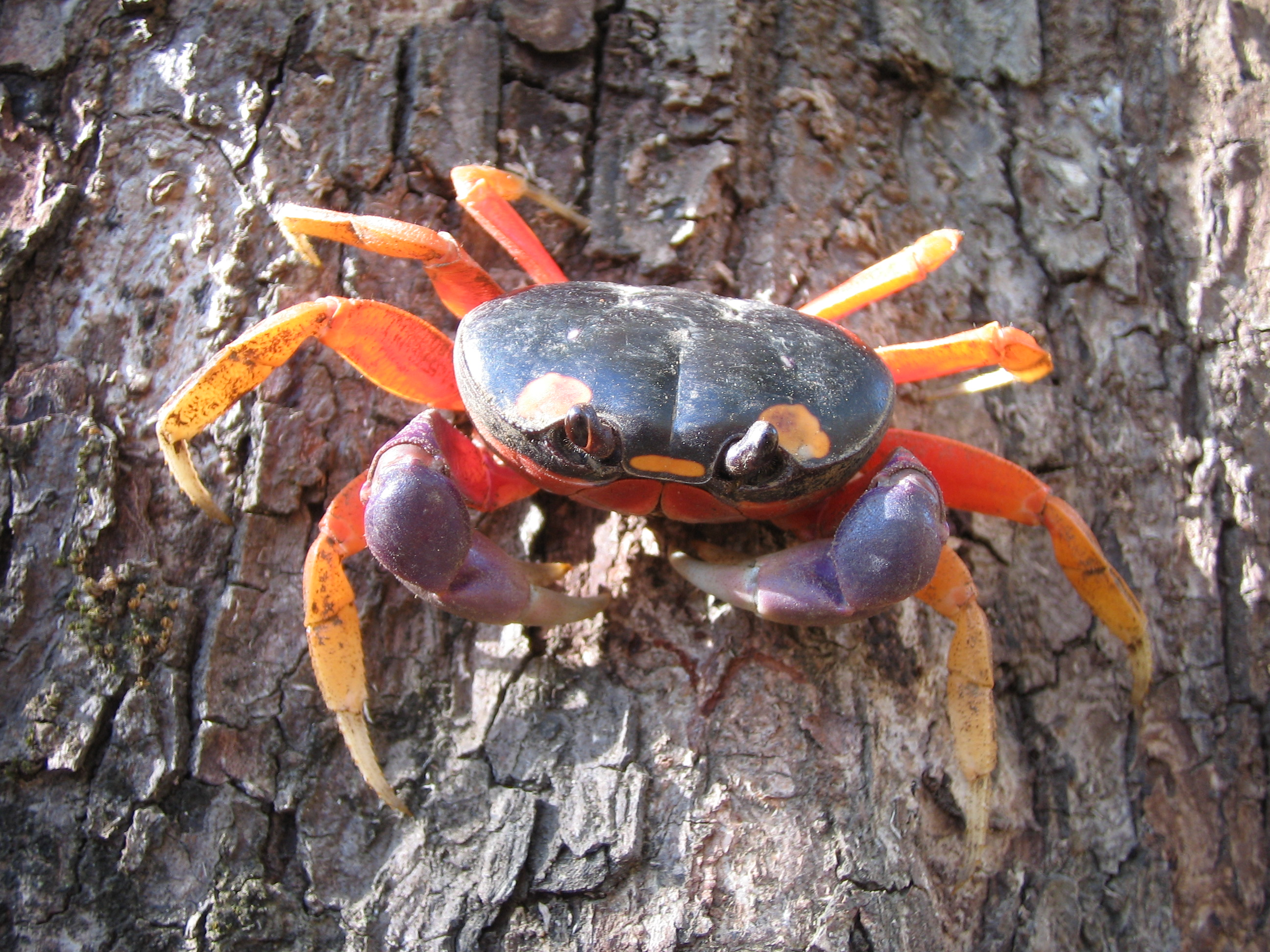 Gecarcinus quadratus (Halloween crab) at Nosara, Costa Rica